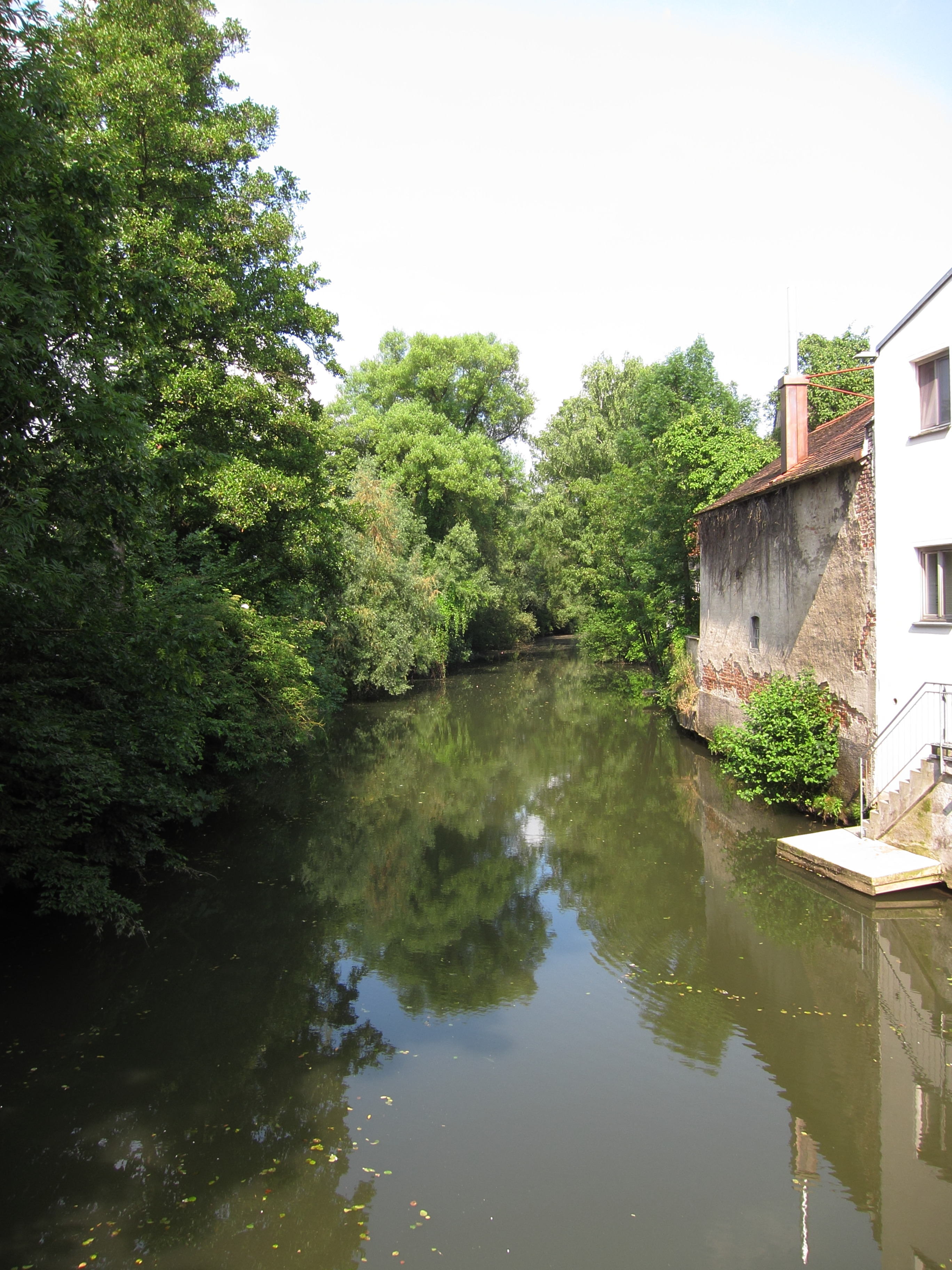 Fluss Isen in Dorfen, Ansicht vom Johannisplatz